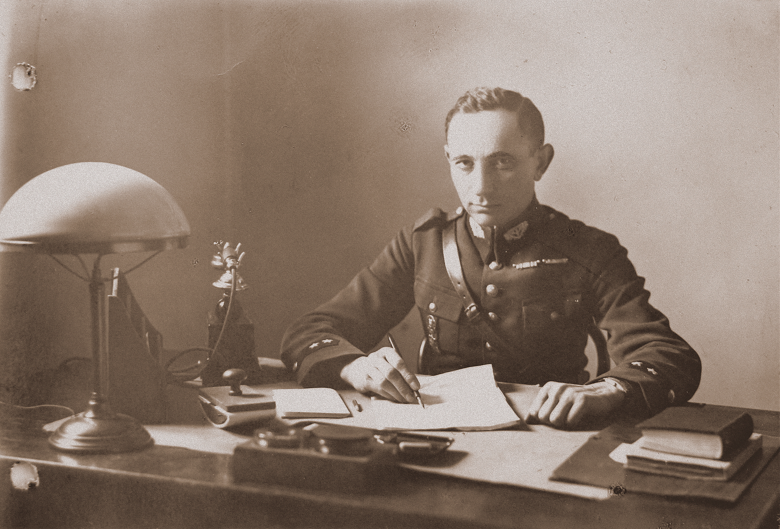 Bolesław Sciegienny - komendant komisariatu SG Rychtak